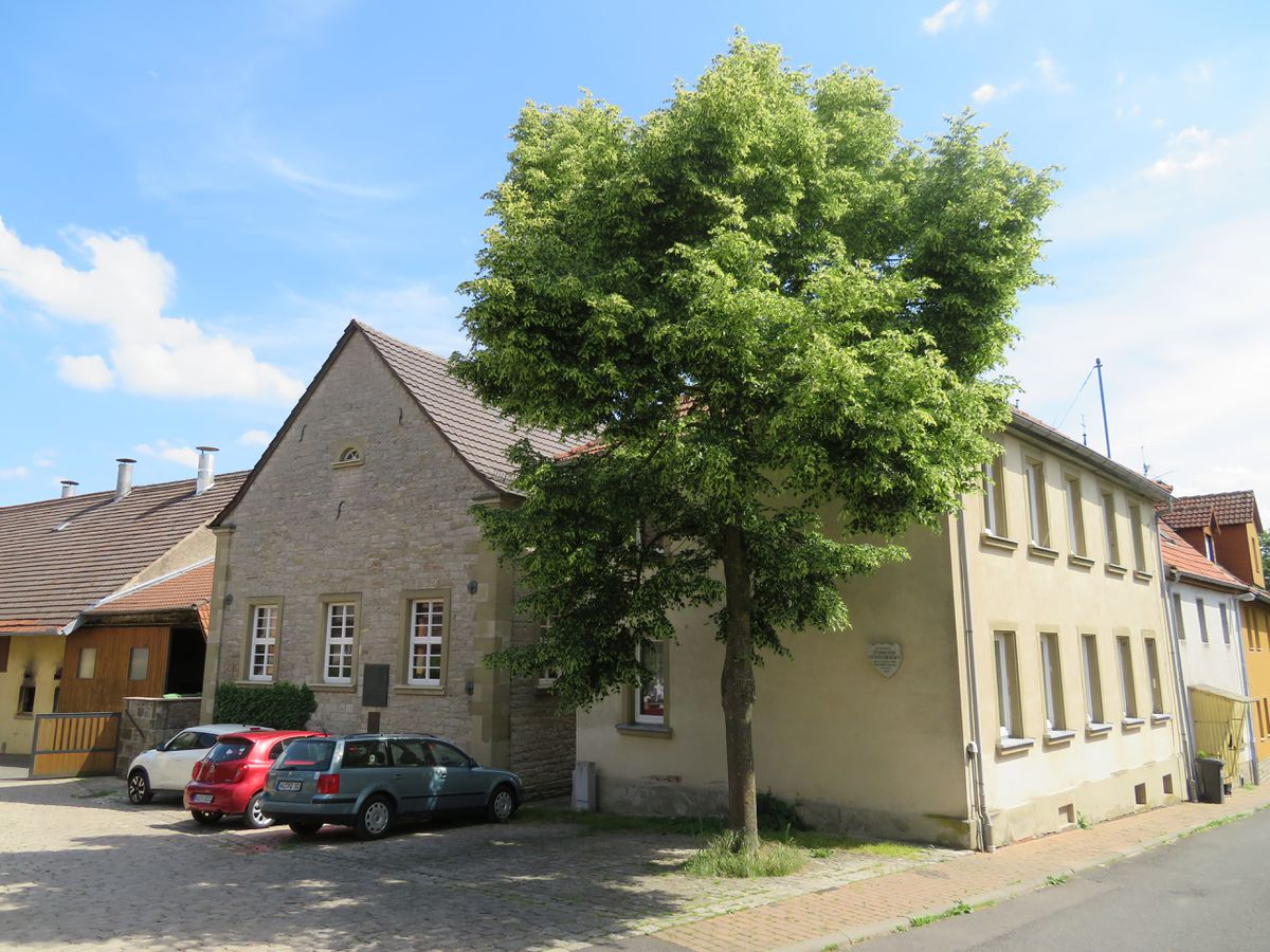 Synagoge (links) und ehemaliges jüdisches Schulhaus in Gaukönigshofen. Die Synagoge beherbergt heute die Jüdische Gedenkstätte Gaukönigshofen.